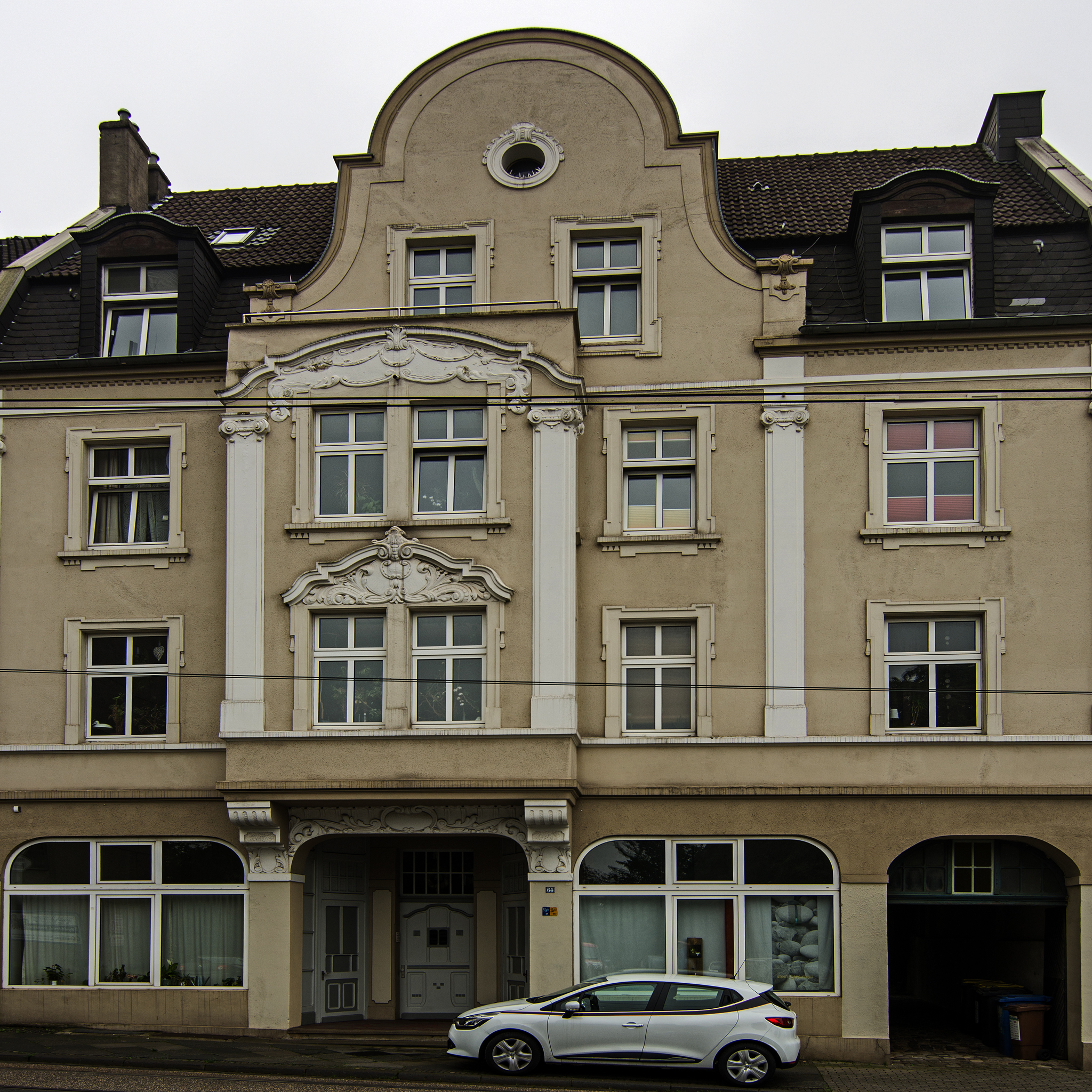 Wohnhaus eines Opfers des Naziterrors